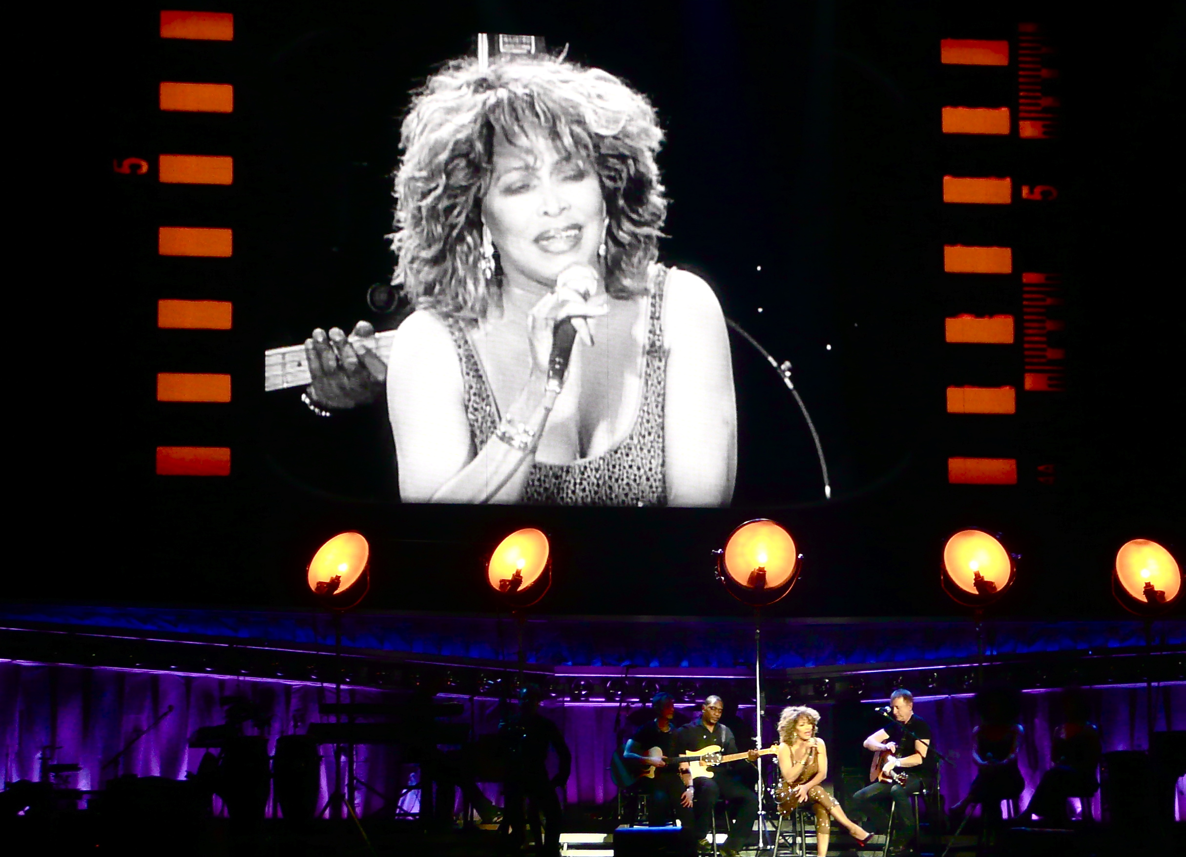 Concierto de Tina Turner.